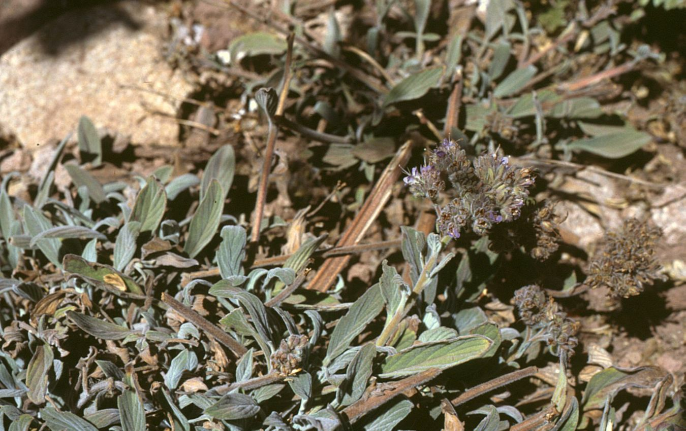 Phacelia secunda, Wasserblattgewächse (Hydrophyllaceae) - Argentinien/Argentina, Paso de Uspallata, Puente del Inca, ca. 2700 m s.m. (Prov. Mendoza)